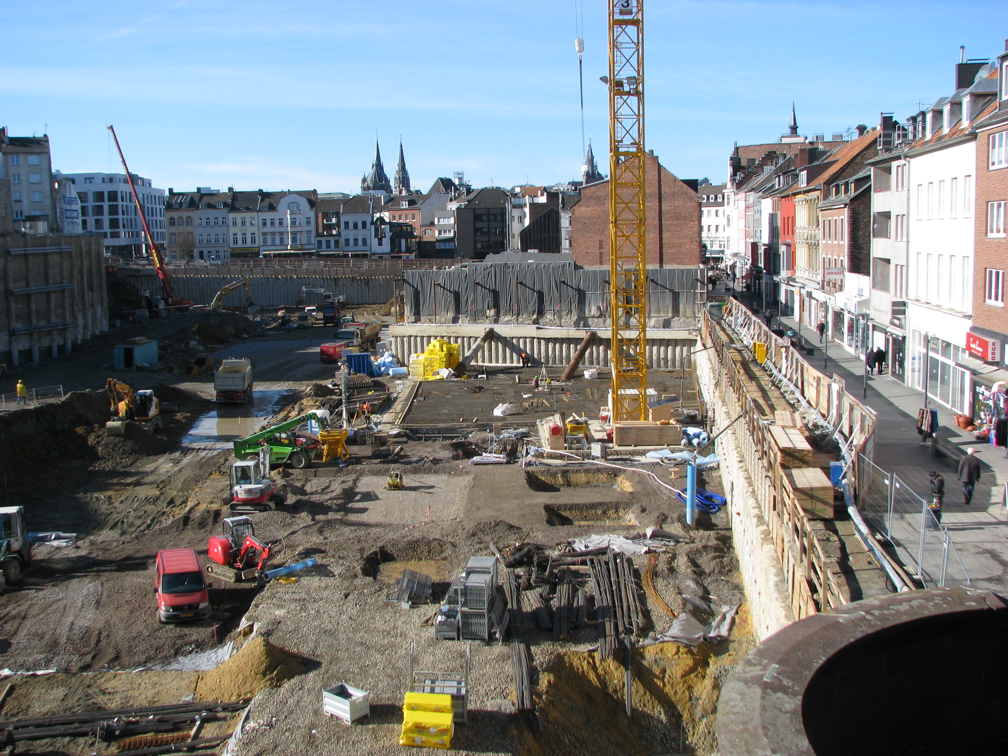 Baustelle des Einkaufszentrums Aquis Plaza am Kaiserplatz in Aachen am 12. Februar 2014.